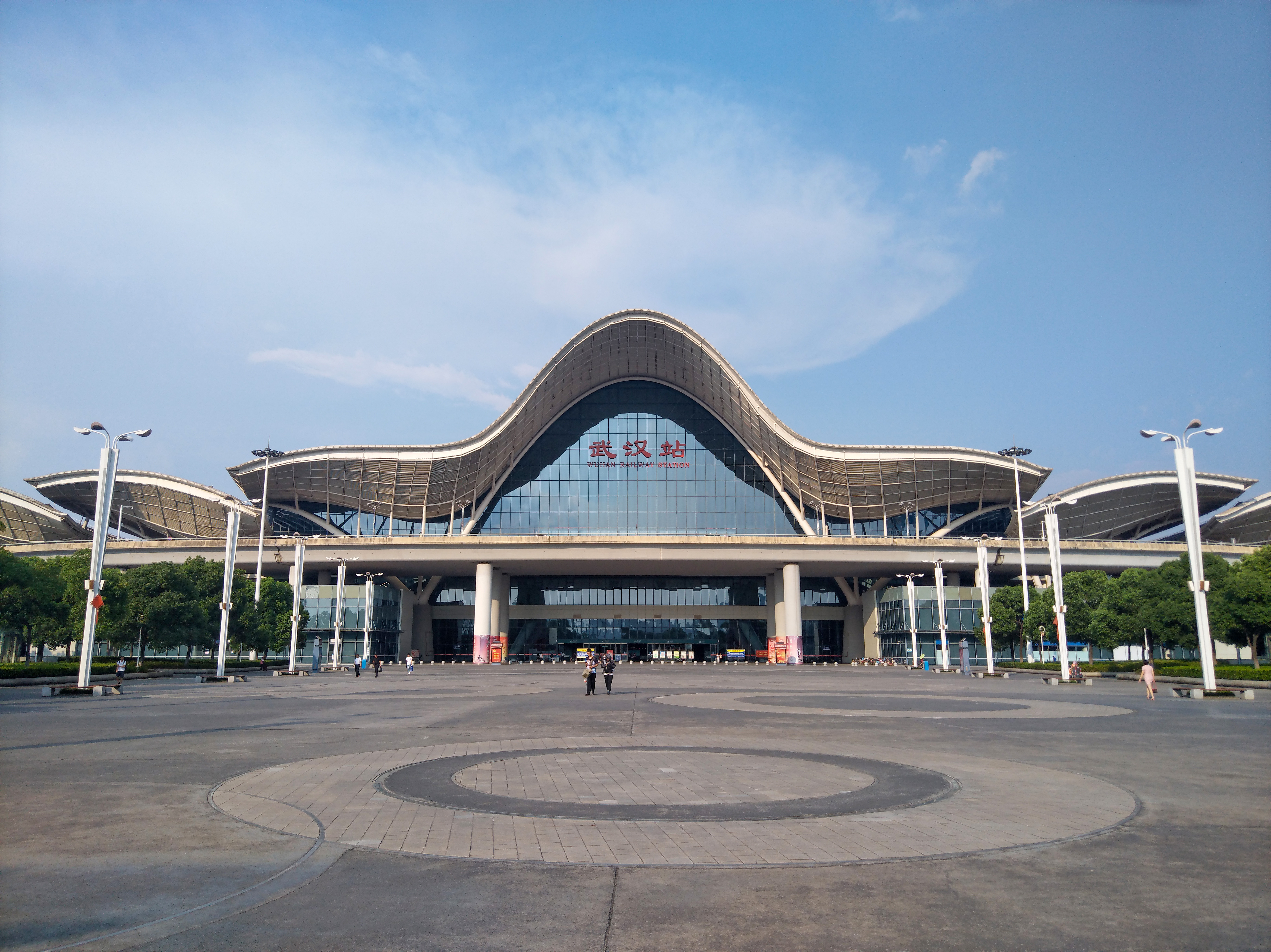 武汉火车站